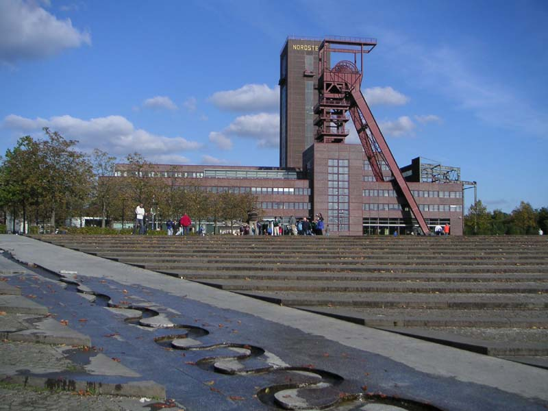 Auf dem Bild ist ein Teil der ehemaligen Zeche Nordstern im Stadtteil Horst zu sehen. Das Gebäude ist heute die Hauptvervaltung der THS und die Sehenswürdigkeit im Nordsternpark. In der Weihnachtszeit ist ein beleuchteter, metallener Weichnachtsbaum auf der Spitze des Turms aufgestellt.